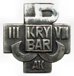 Odznaka Zgrupowania AK Krybar. Opis odznaki: Krzyż równoramienny, z białego metalu o wymiarach 17x17 mm, z symbolem "kotwicy". W środku kwadratowa tarcza z napisem KRYBAR a na ramionach numery pododdziałów "Krybara": III-VIII AK